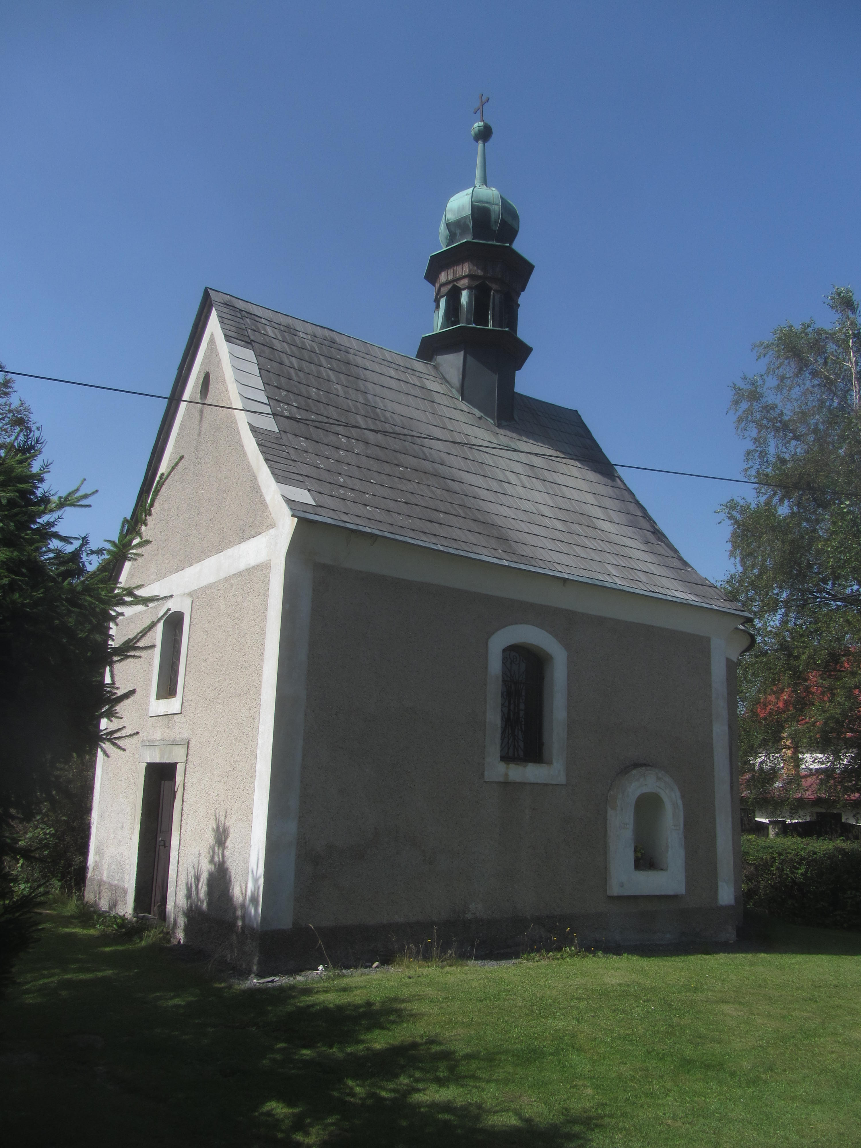 Kaple Sedmibolestné P. Marie, Milíře, okres Jablonec nad Nisou